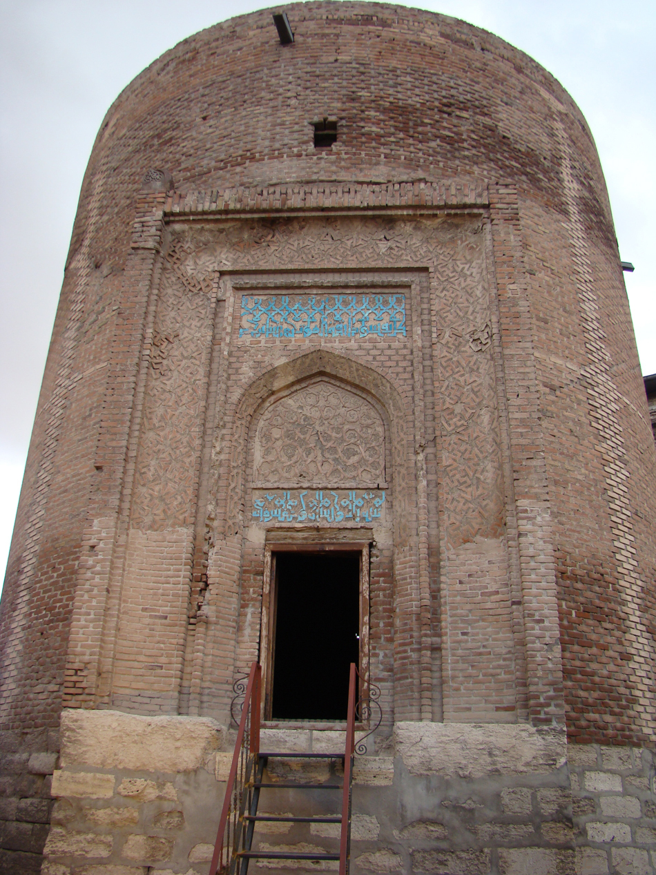 گنبد مدور مراغه